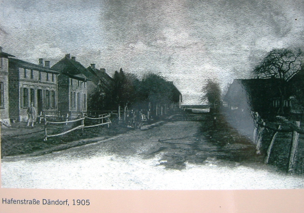 Aufnahme der Hafenstraße in Dierhagen-Dändorf aus dem Jahr 1905. Das Foto ist auf einer Geschichtstafel am Hafen aufgedruckt.